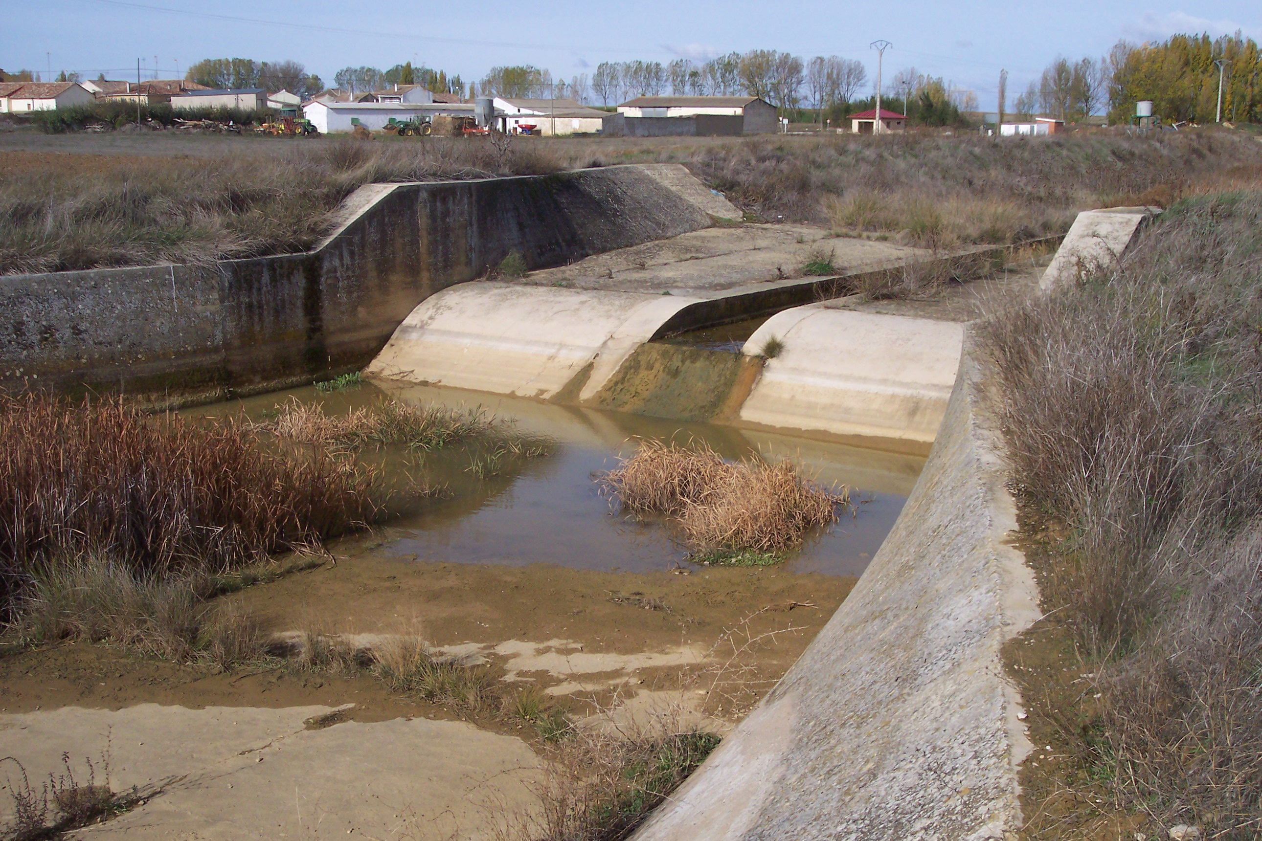 Salto de agua en el cauce del río Valdeginate a su paso por San Román de la Cuba (Palencia, España).